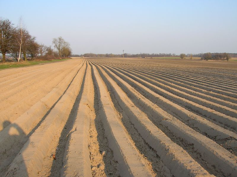 Świeżo zaorane pole (redliny) w Bratoszewicach, tuż za boiskiem ZSR.